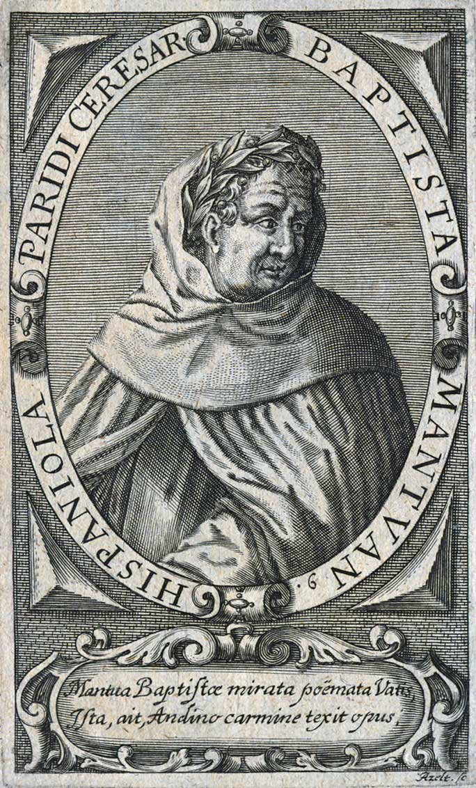 Battista Mantovano (1447-1516), poet and humanist.